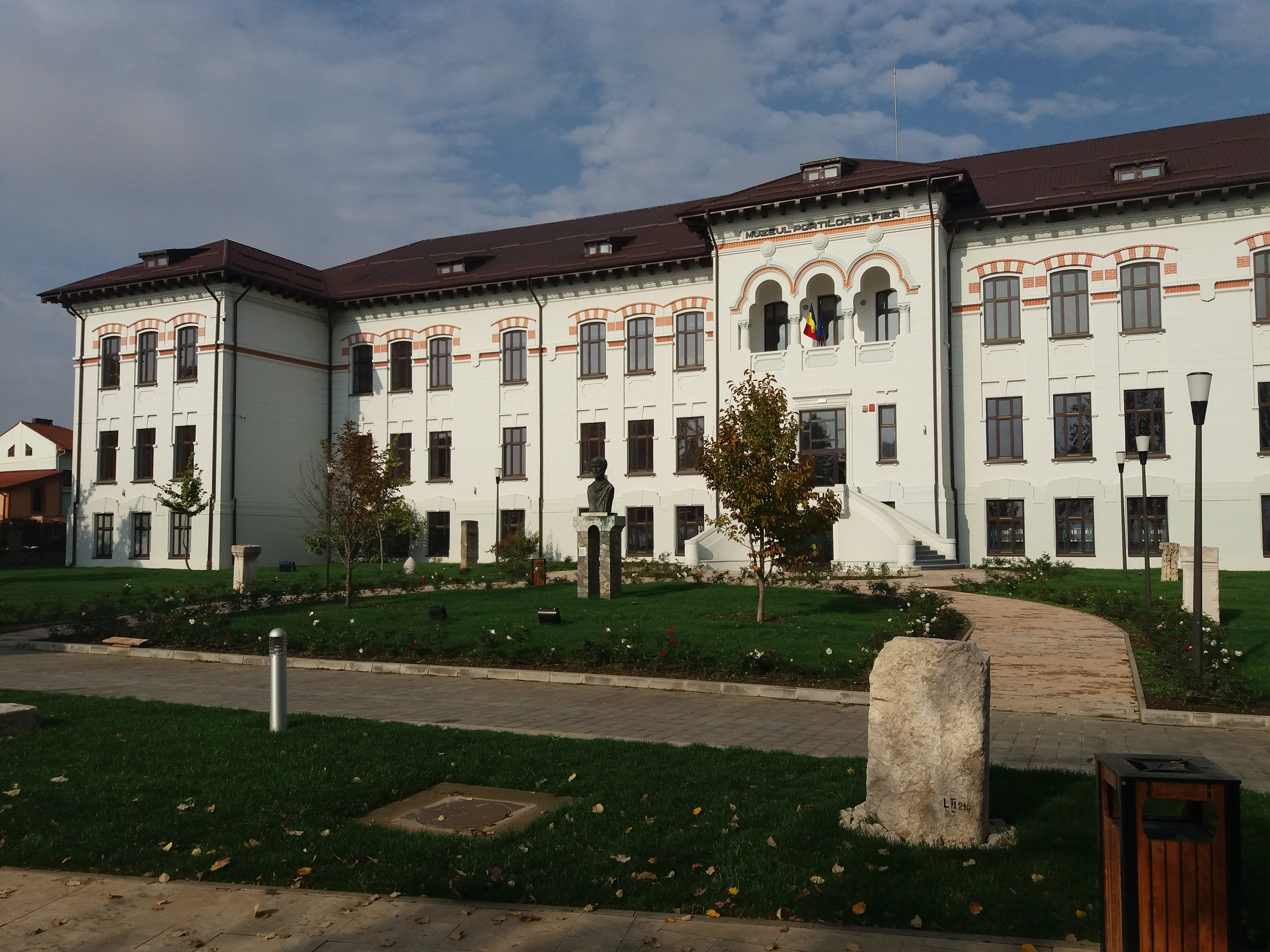 Muzeul Regiunii Porților de Fier este un muzeu regional din Drobeta-Turnu Severin, amplasat în Str. Independenței nr. 2.